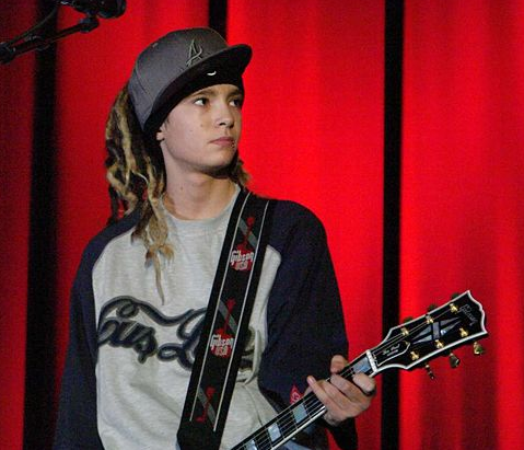 Tom Kaulitz, guitarrista de Tokio Hotel